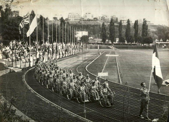 Squadra italiana alla cerimonia di apertura delle Paralimpiadi di Roma 1960